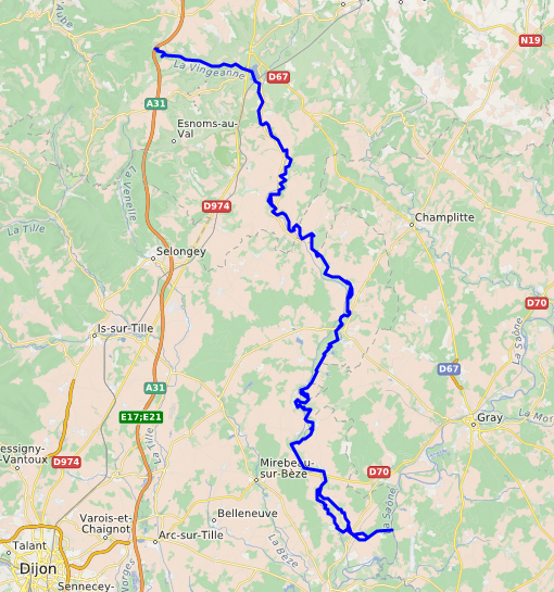 carte réalisée sur umap This map may be incomplete, and may contain errors. Don't rely solely on it for navigation.